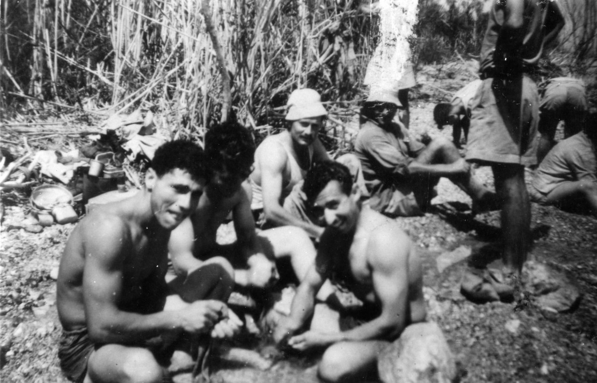 "השחר" המחלקה הערבית - יצחק שושן ובלפור ענבי - יצחק שושן (מימין) ובלפור ענבי(משמאל) ברגע של כביסה.. יצחק שושן ובלפור ענבי